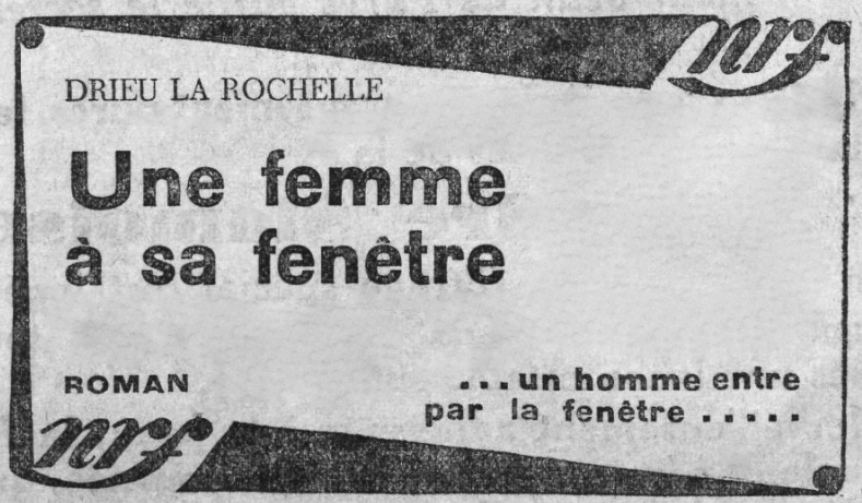 Encart publicitaire pour le livre de Drieu la Rochelle, "Une femme à sa fenêtre", "Paris-Soir", 12 mars 1930.